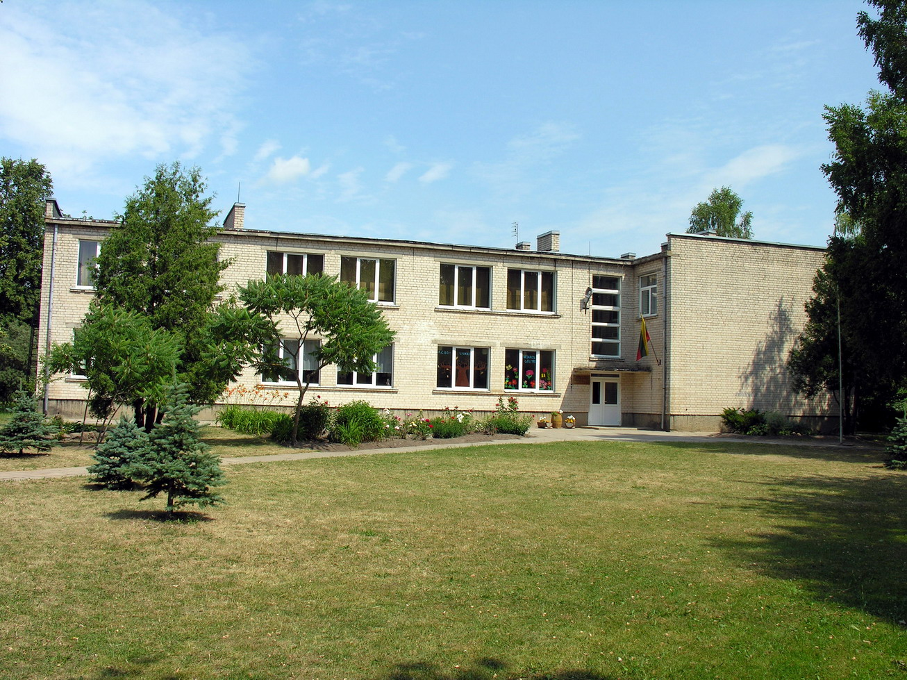 Užlieknė, Mažeikių raj., Tirkšlių seniūnija Užlieknės pagrindinė mokykla Foto: Algirdas, 2006 m. liepos 12 d., Lietuva